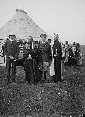 ביקורו השני של he:הרברט סמואל בhe:ירדן. בתמונה מופיעים הרברט סמואל, he:המלך עבדאללה הראשון, וhe:וינדהאם דידס